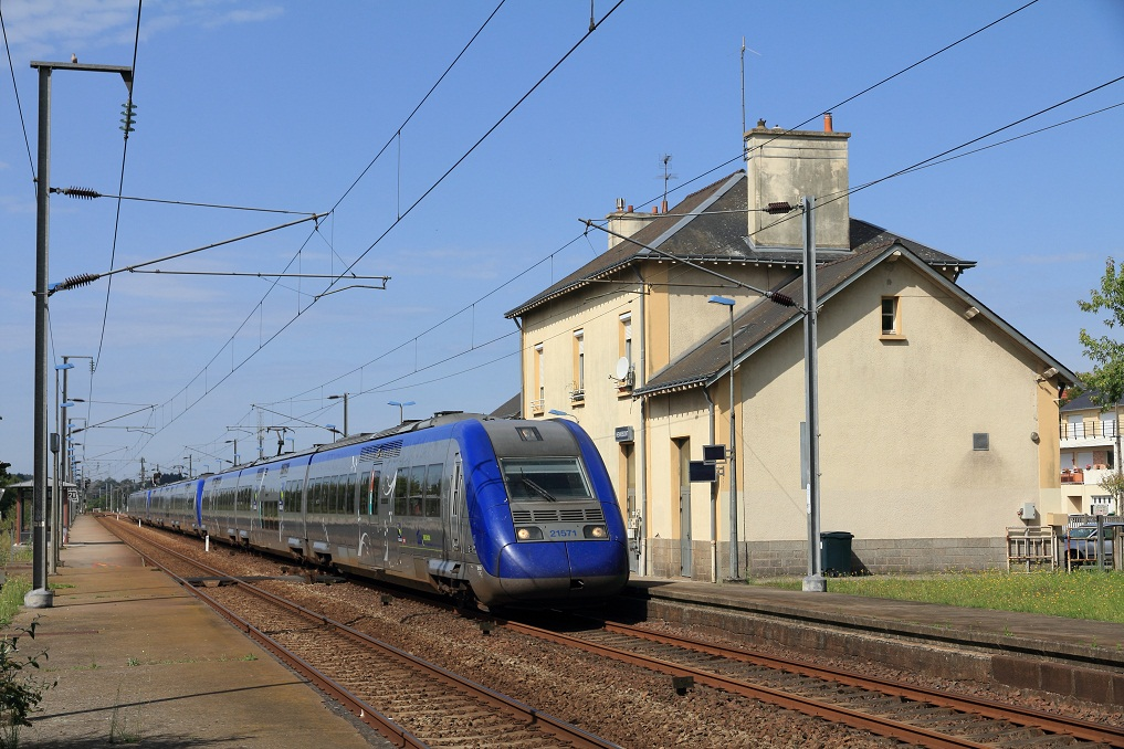 Vue du train n°13894 à quai en gare d'Hennebont en direction de Nantes en août 2011, Bretagne, France.